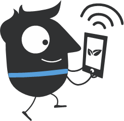 Maskotka ETZT - tzw. Edgar